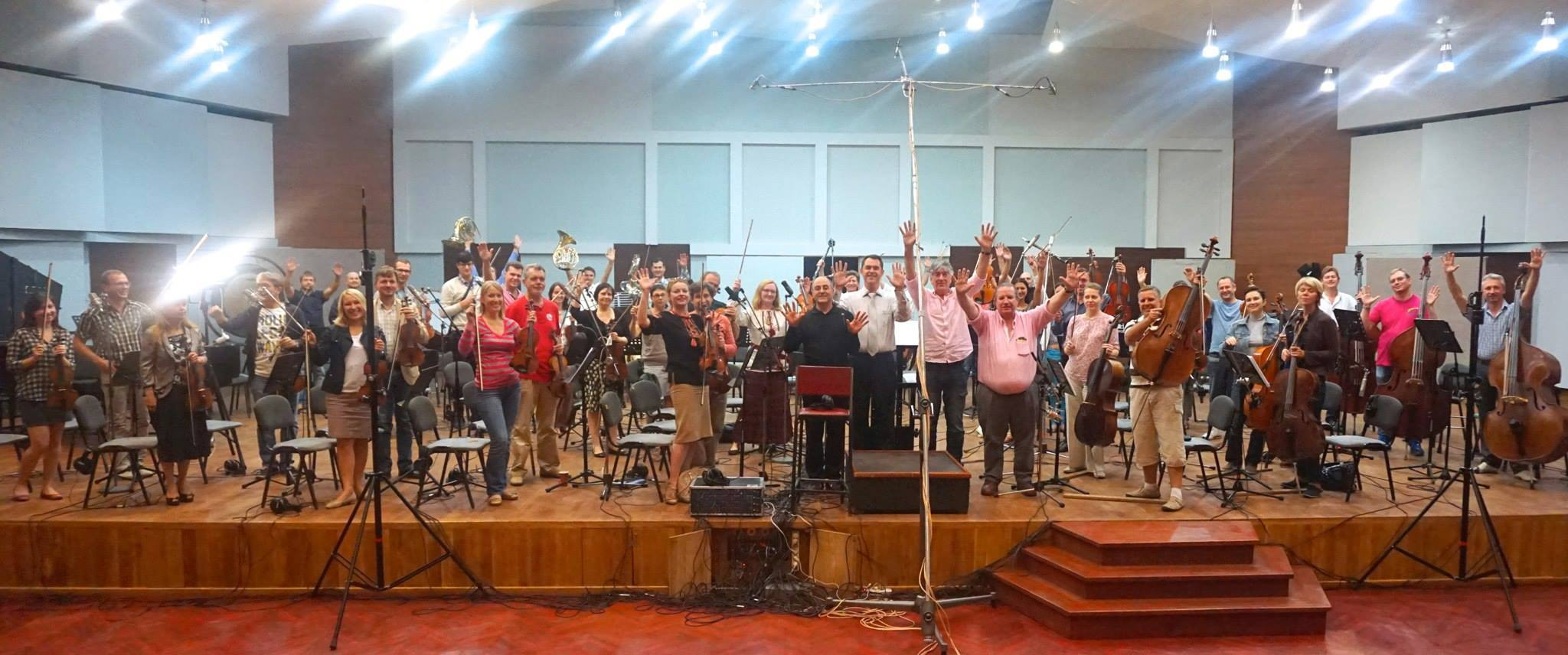 Saludo general al finalizar la grabación con la Orquesta Sinfónica de Kiev, Ucrania, 2015